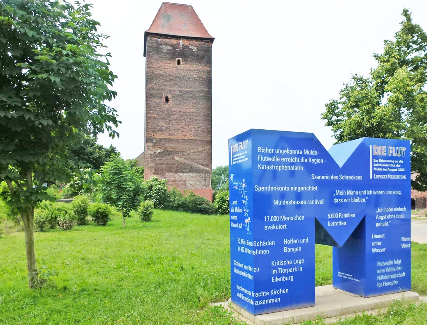 Wendenturm und Flutdenkmal 2002 in Gruna